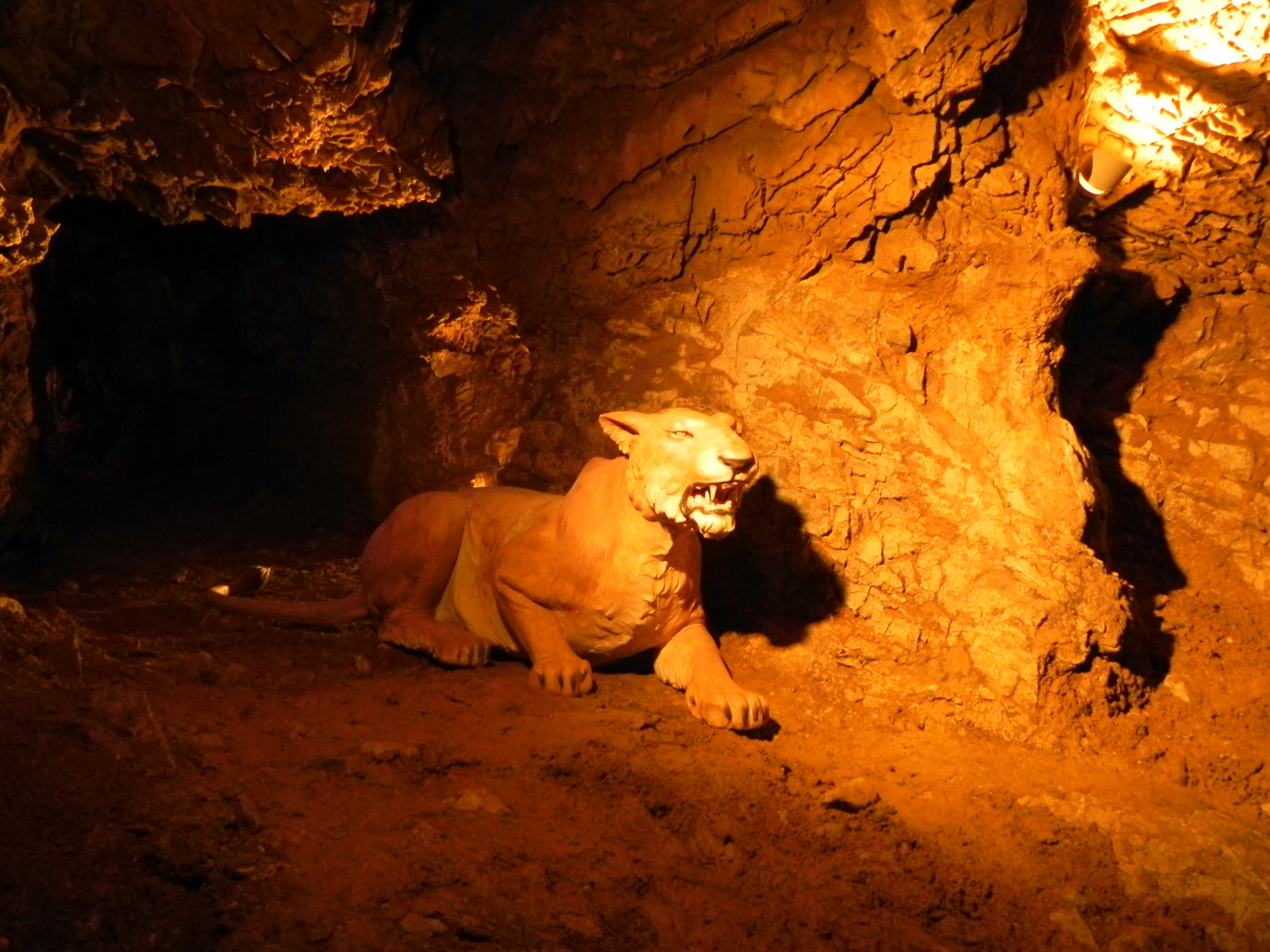 jeskynný lev